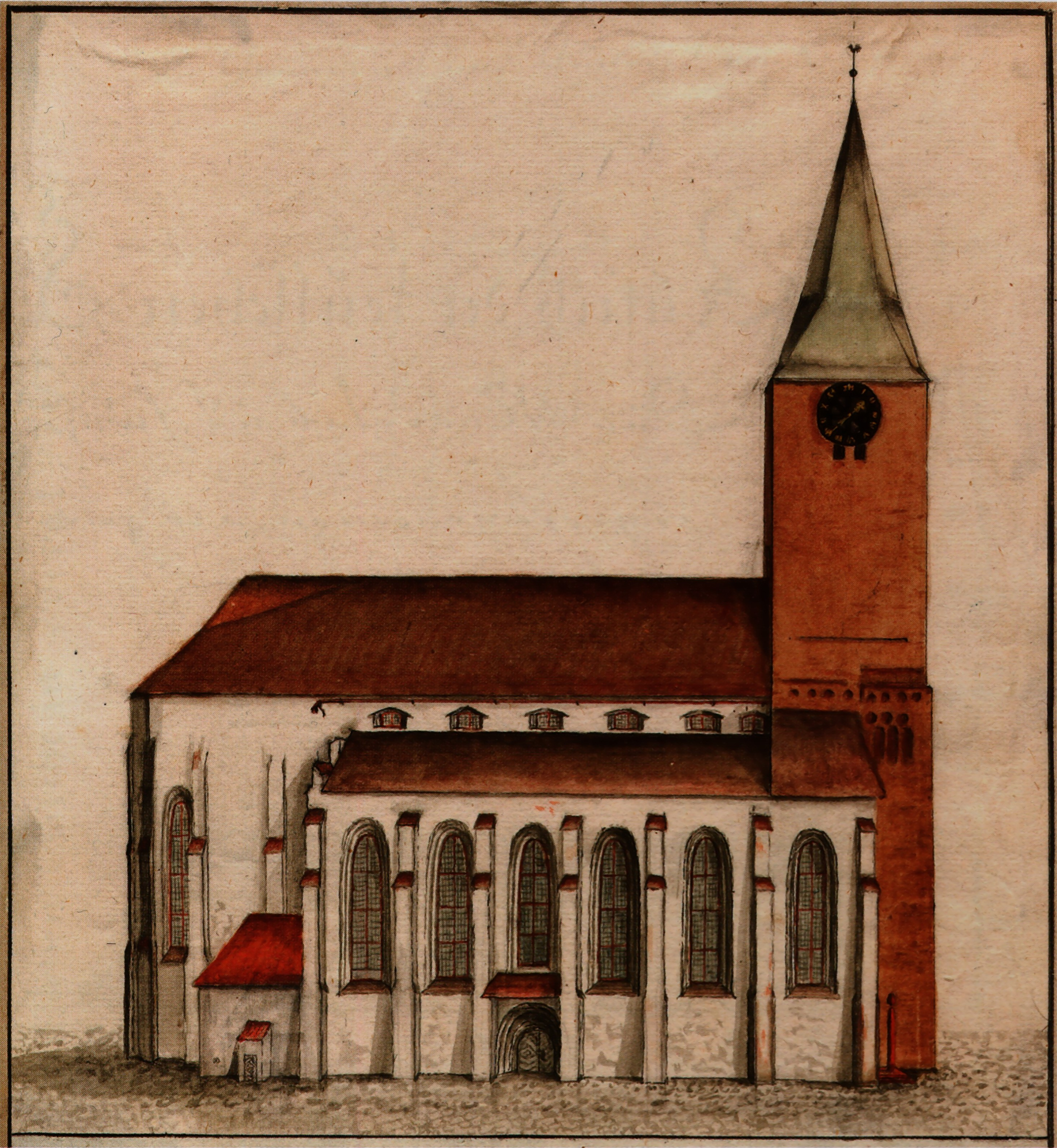 Tartu Jaani kirik